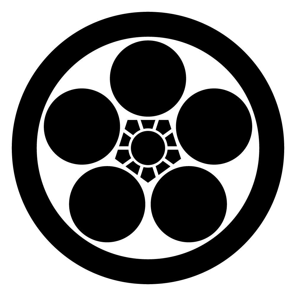 日本の家紋